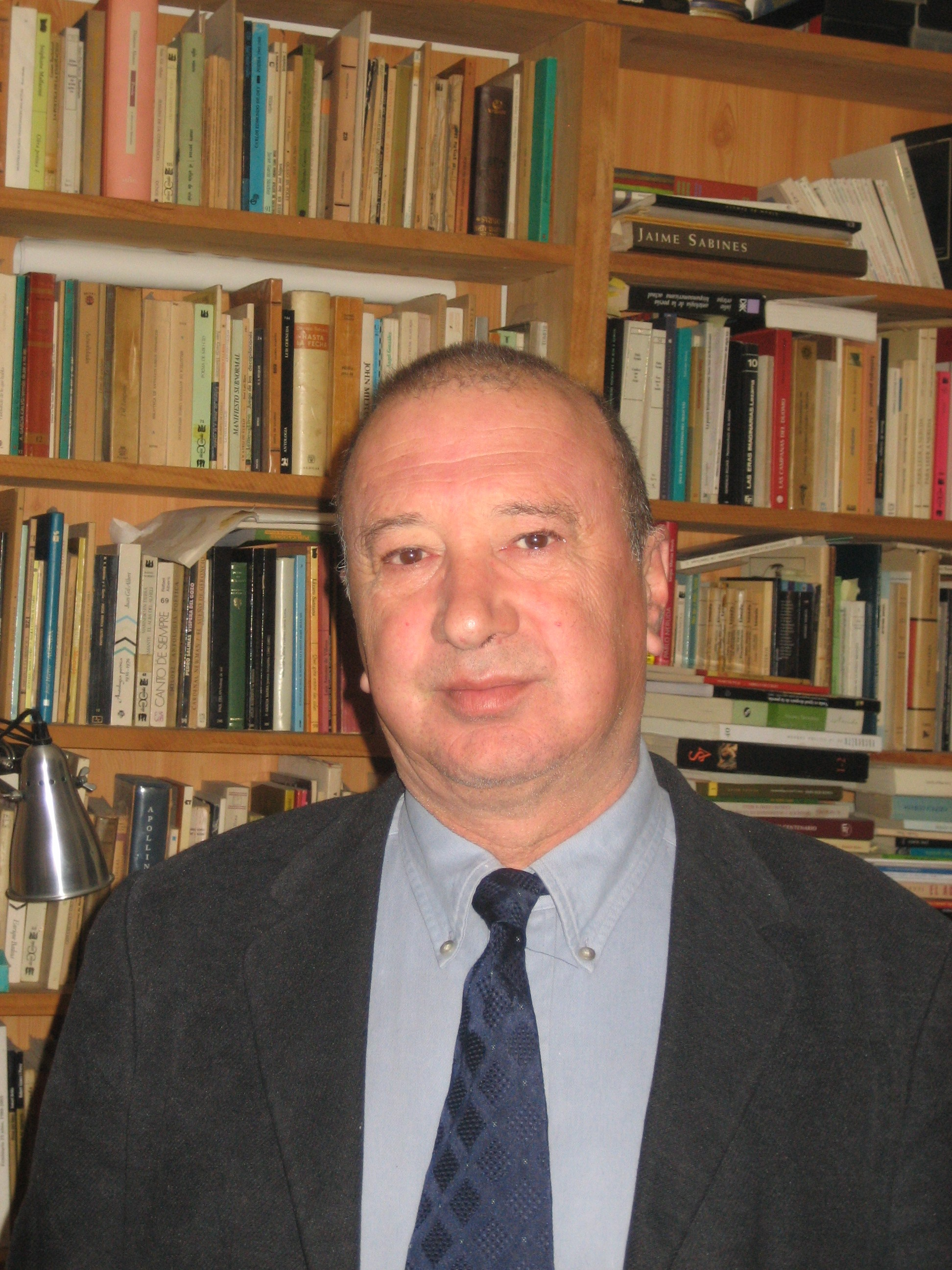 Fotografía del profesor en su casa de San Vicente del Raspeig